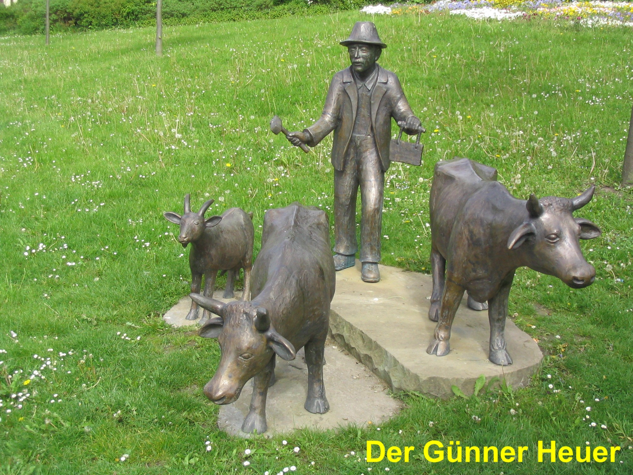 Figurengruppe „Der Günner Heuer“ am Dorfplatz in Möhnesee-Günne